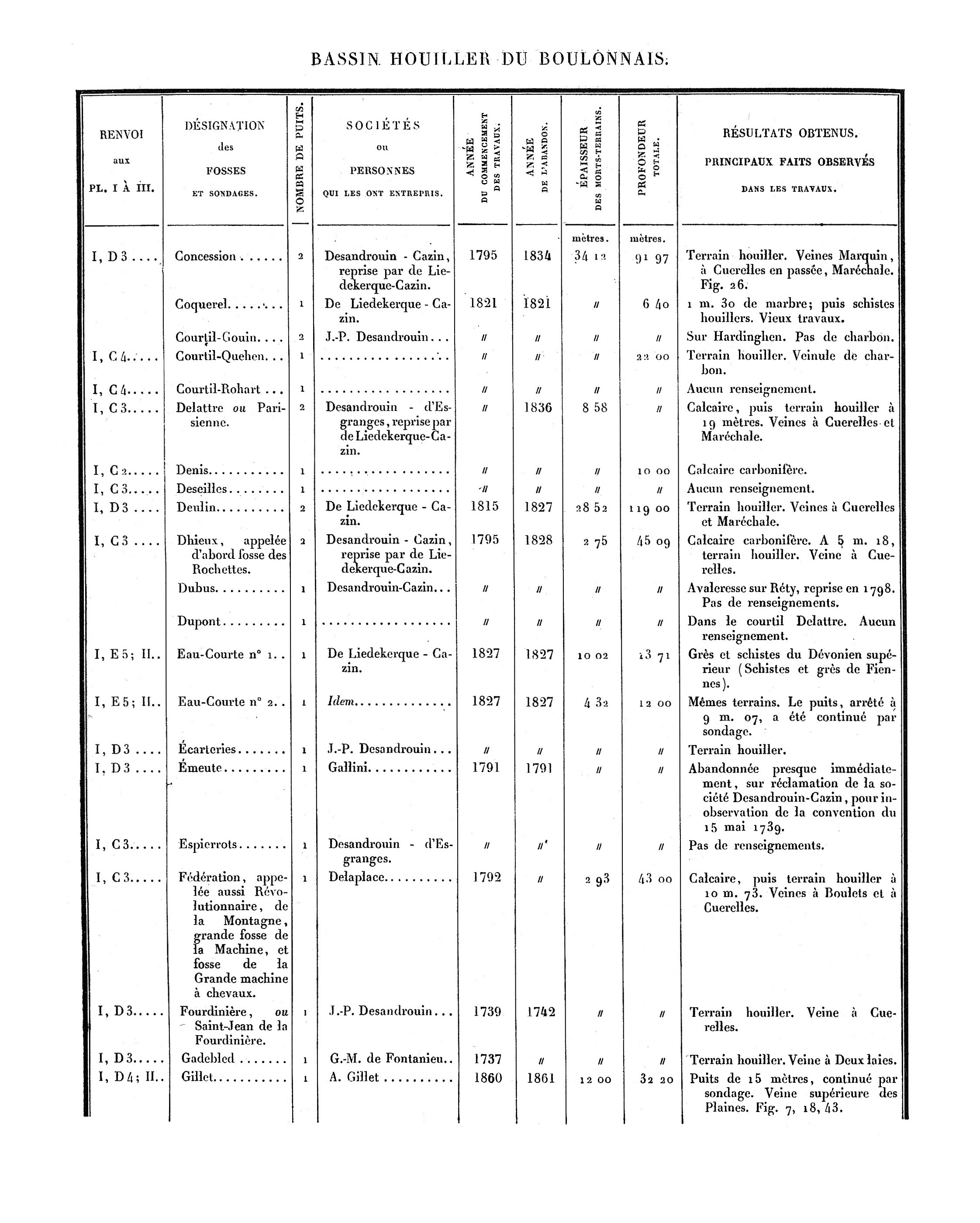 Liste des puits de mine et des sondages. Mines du Boulonnais. Document extrait de Étude des Gîtes Minéraux de la France. Topographie Souterraine du Bassin Houiller du Boulonnais ou Bassin d'Hardinghen, par A. Olry, ingénieur en chef des Mines. Chapitre IX, pages 172 à 189.